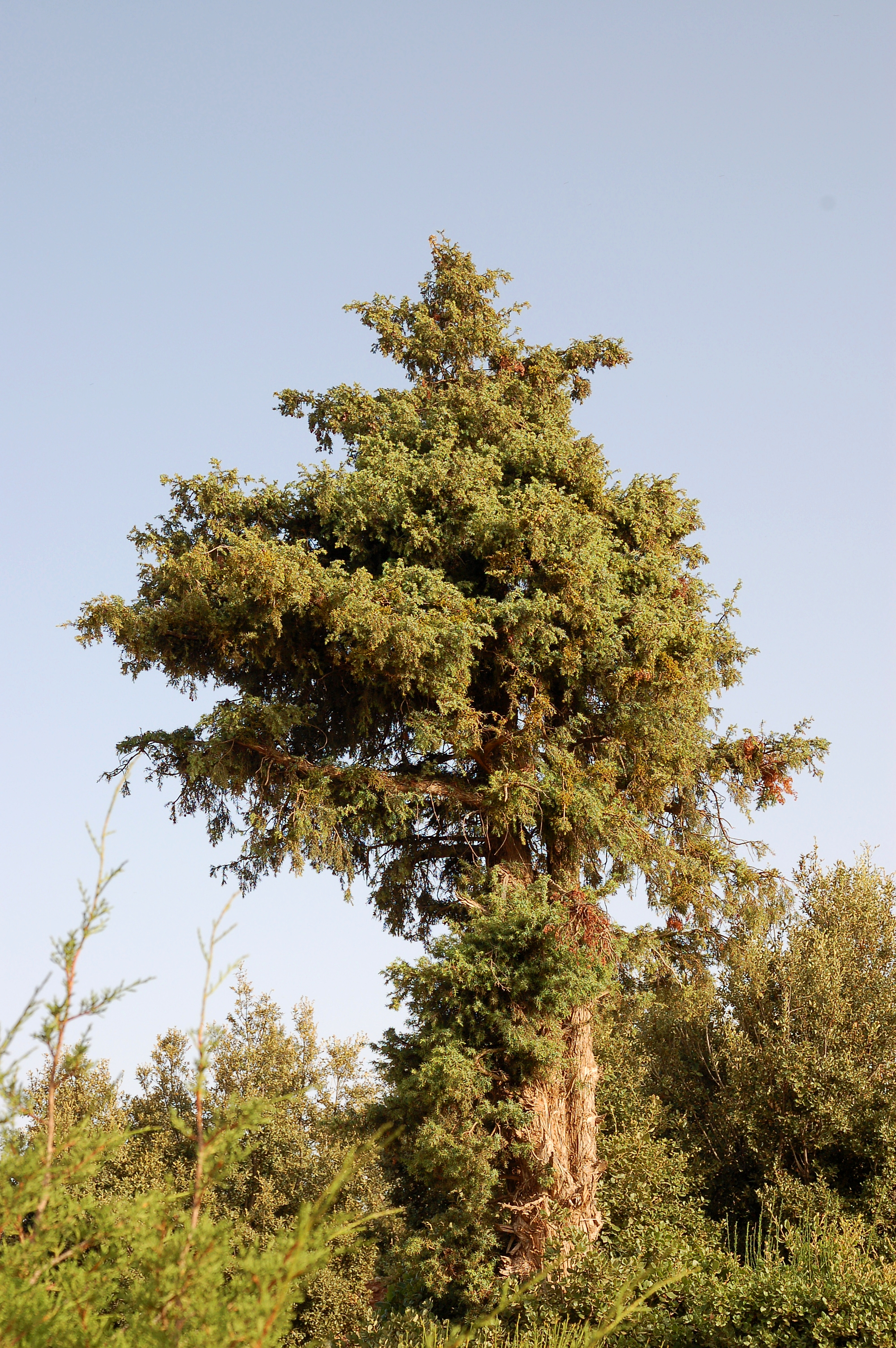 Juniperus oxycedrus in Maroc Atlas vallée de l'Imlil